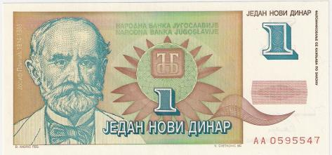 1 Yugoslav dinar note (Novi dinar)